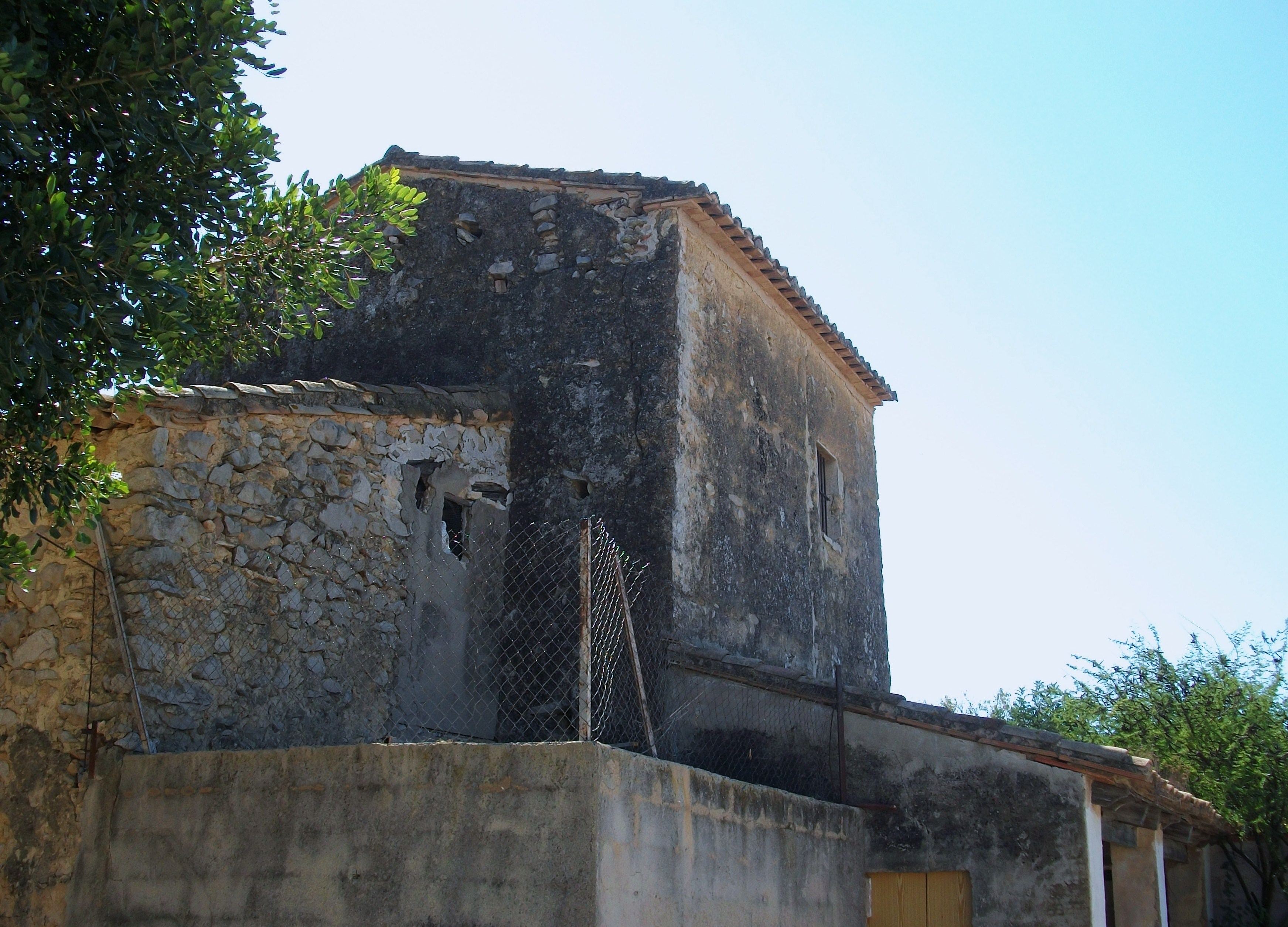 Torreta de Canor a Benissa, Marina Alta, País Valencià.